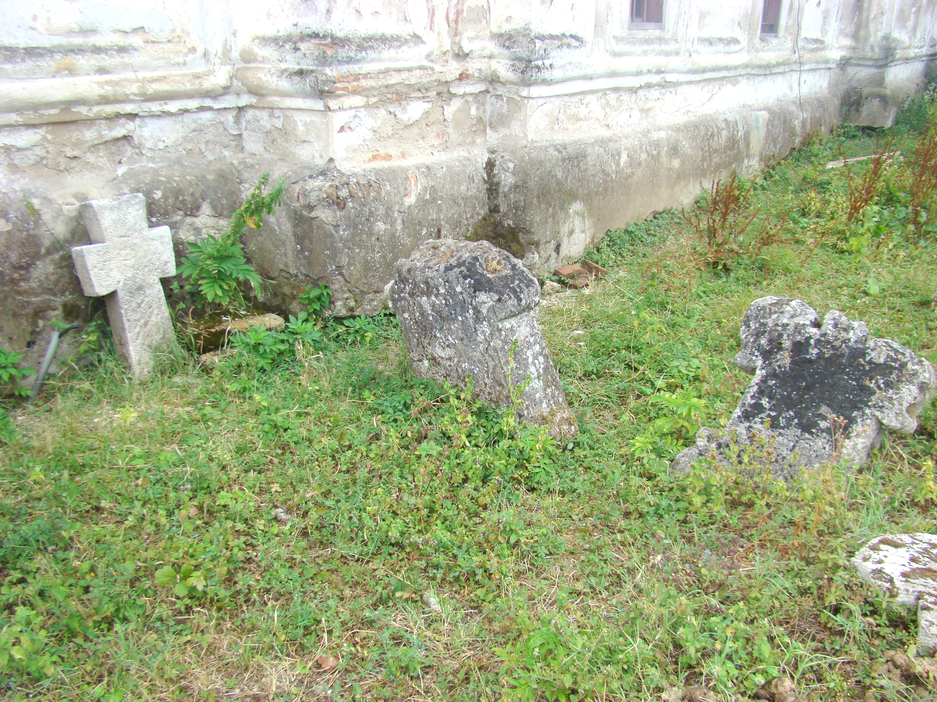 Ansamblul bisericii „Sf. Nicolae”, sat Cerneți; comuna Șimian